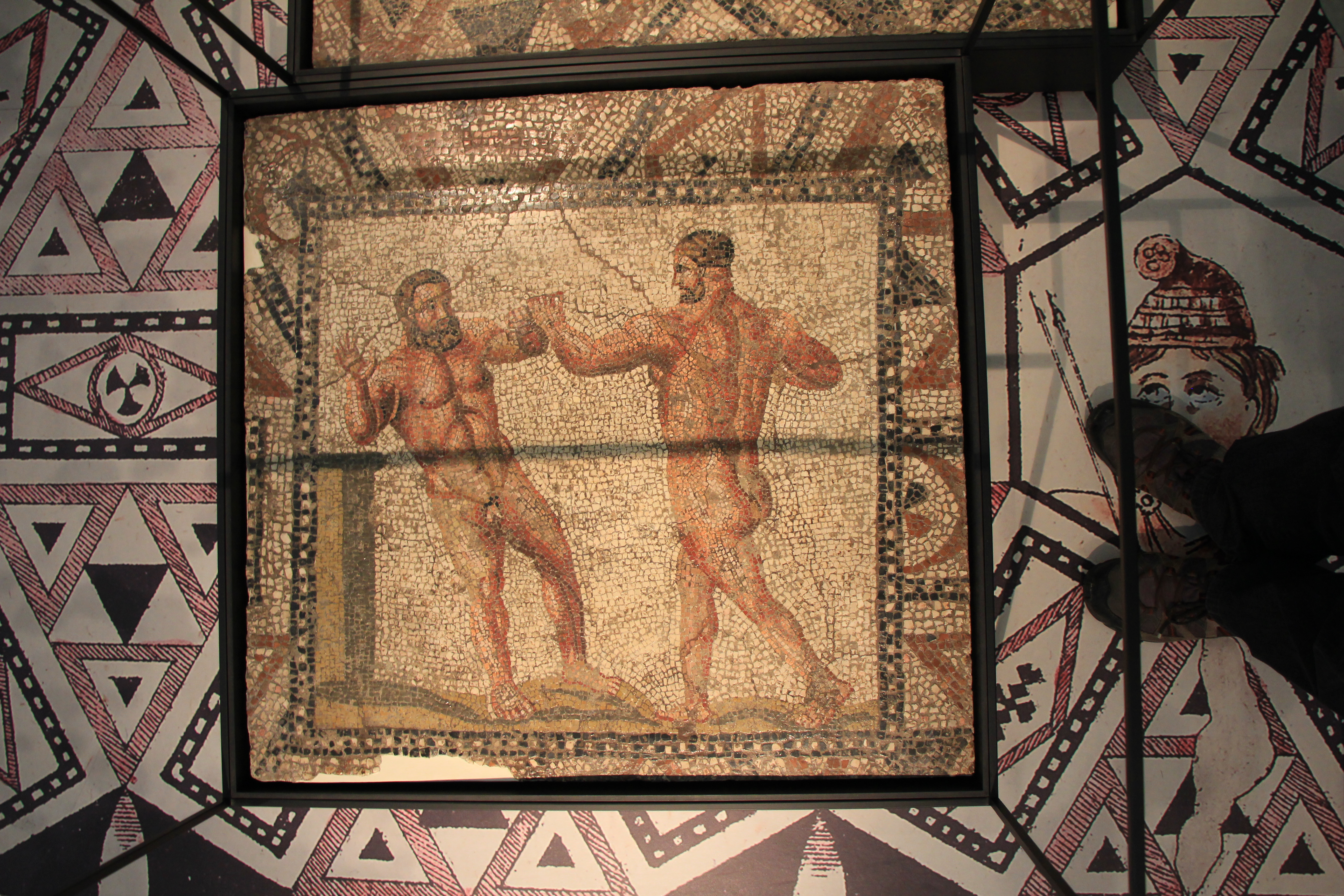 Ausgrabungen vom Mozartplatz im Salzburg Museum